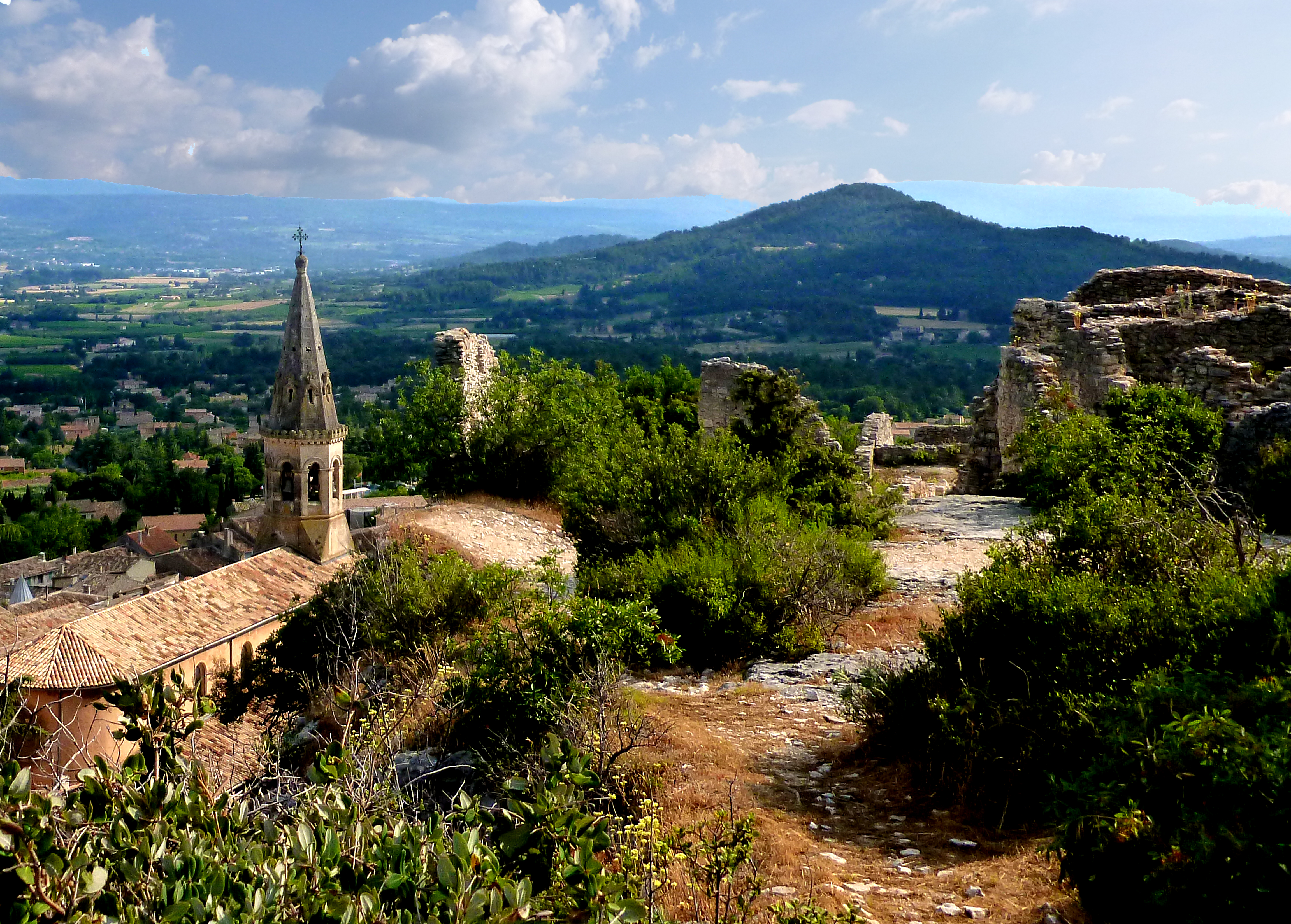 Oppidum de Perréal vu de Saint-Saturnin-lès-Apt